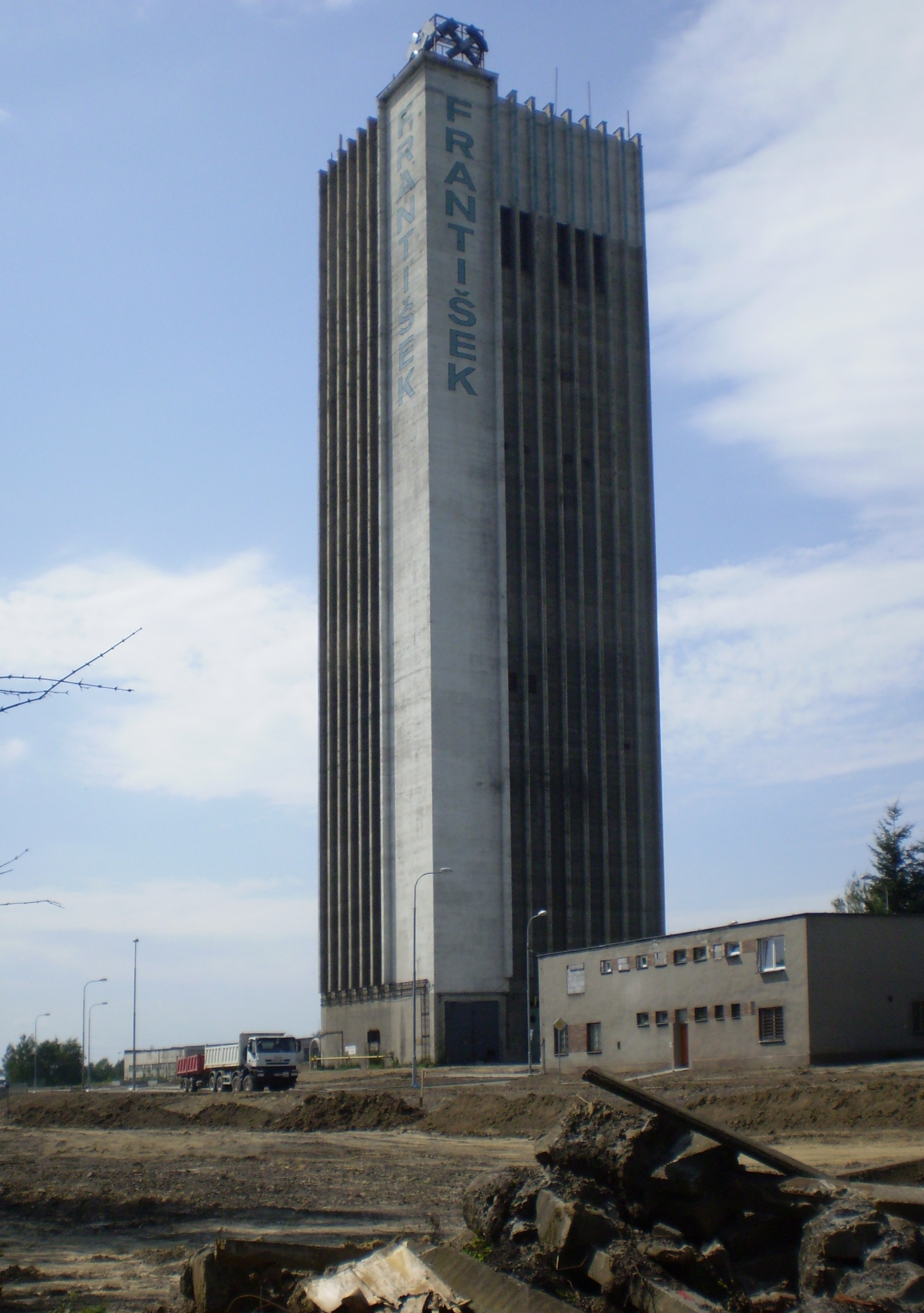 Těžní věž bývalého dolu František v Horní Suché.